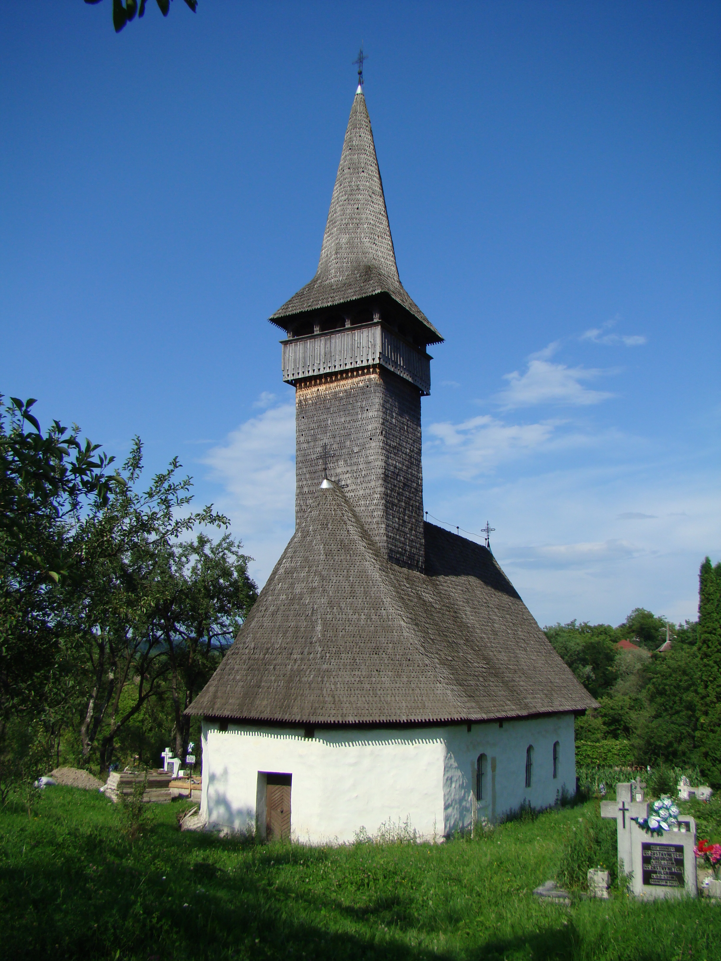 Biserica monument Sf.Arhangheli(1730) 01